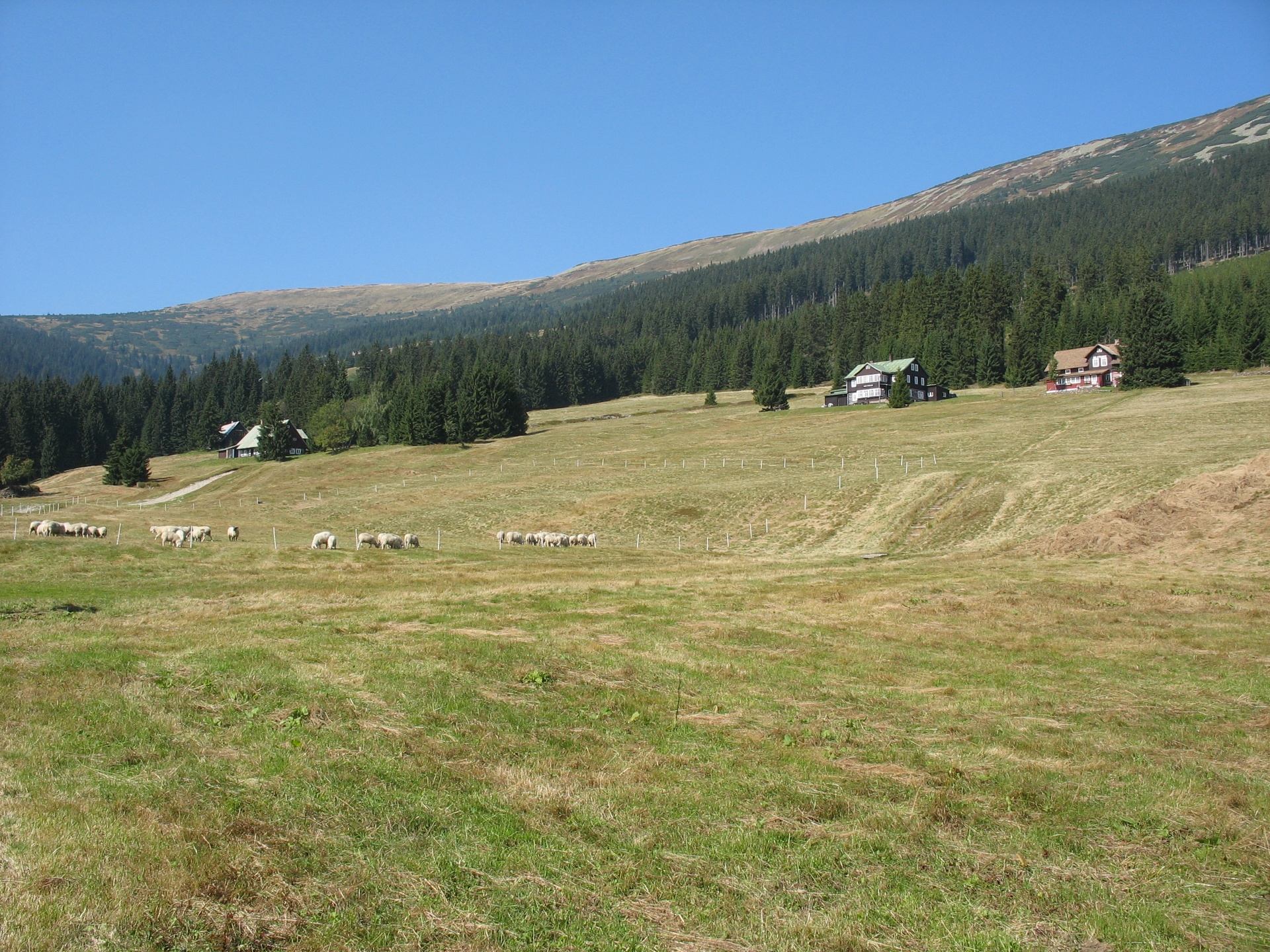 Modrý důl